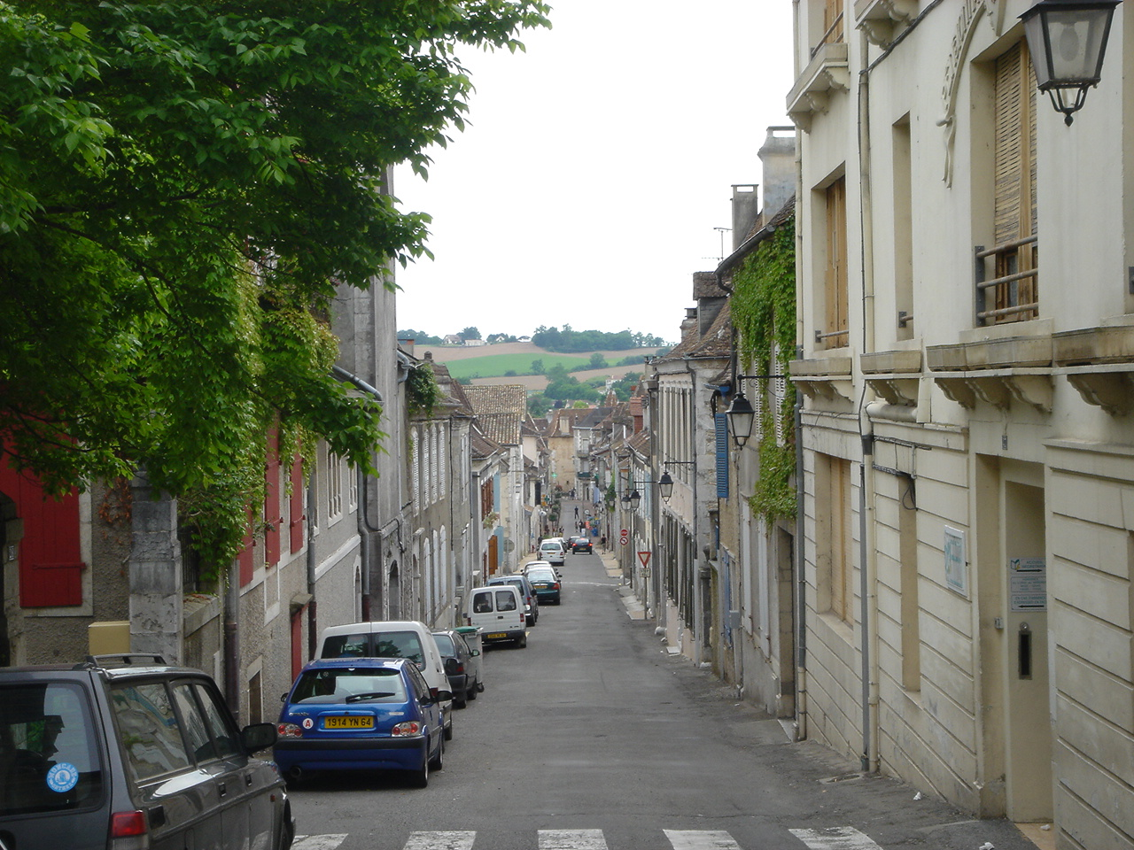 Orthez